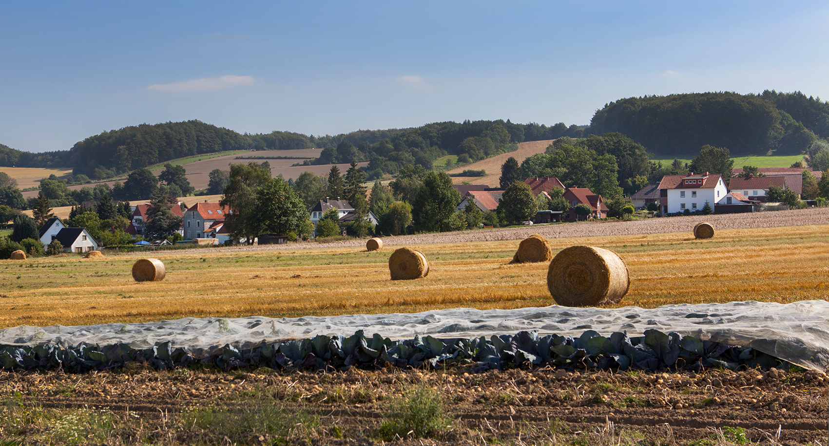 Brosen, Kalletal, Kreis Lippe (Ansicht von Nordwesten)